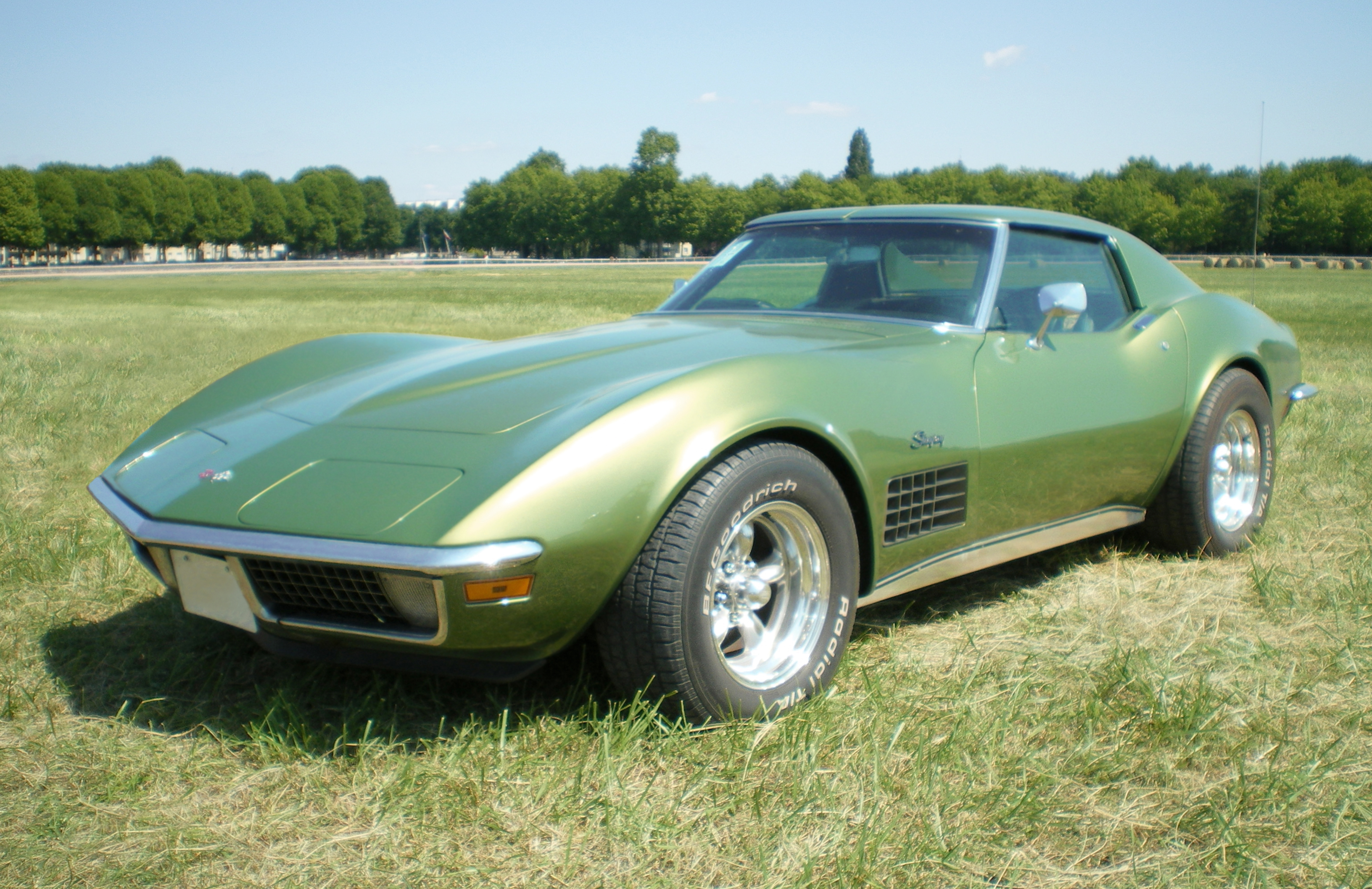 Chevrolet Corvette C3 Stingray.